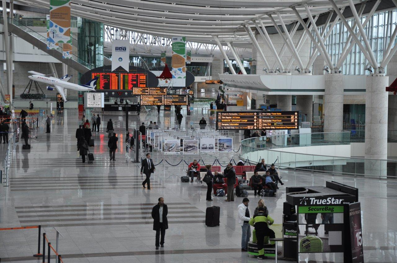 Ankara Esenboğa Havalimanı